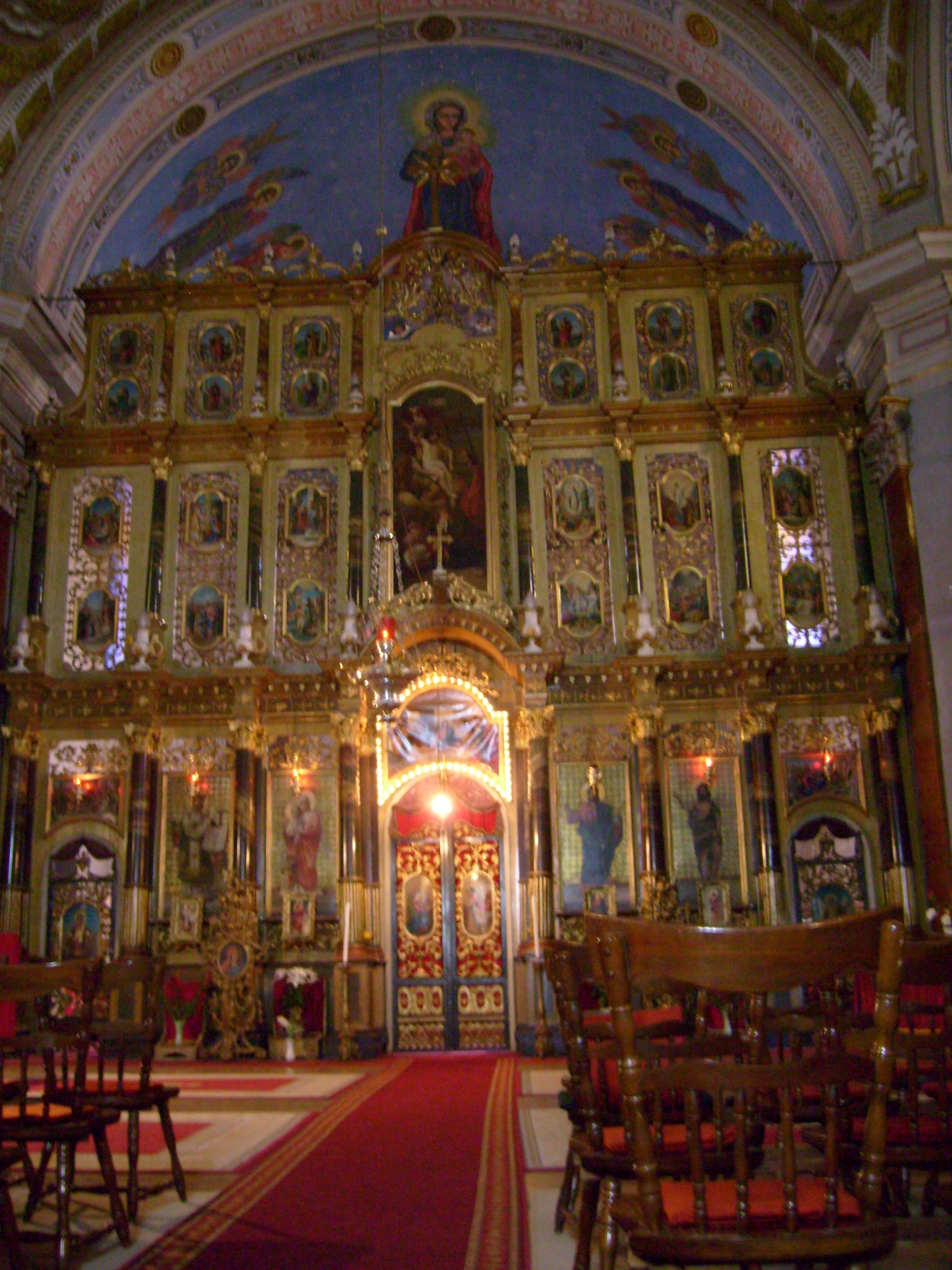 Iconostasul Catedralei Sf. Nicolae din Oradea.